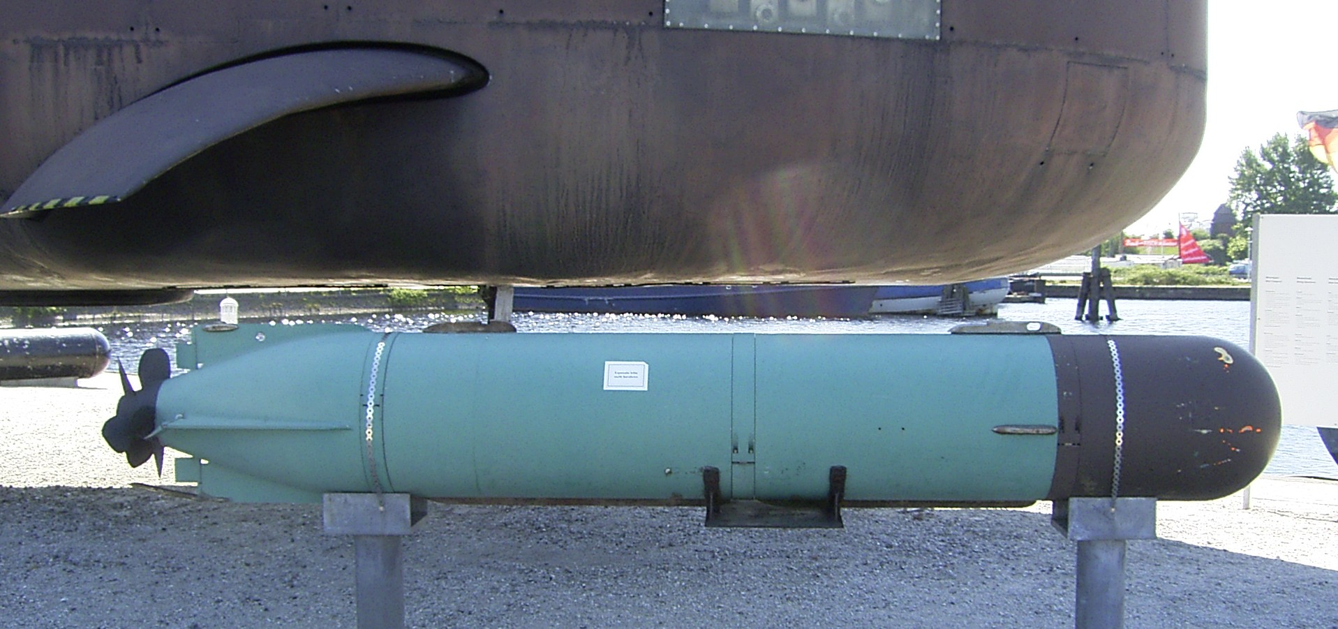 Mark 37 Torpedo Modell 0 im deutschen Marinemuseum Wilhelmshaven.